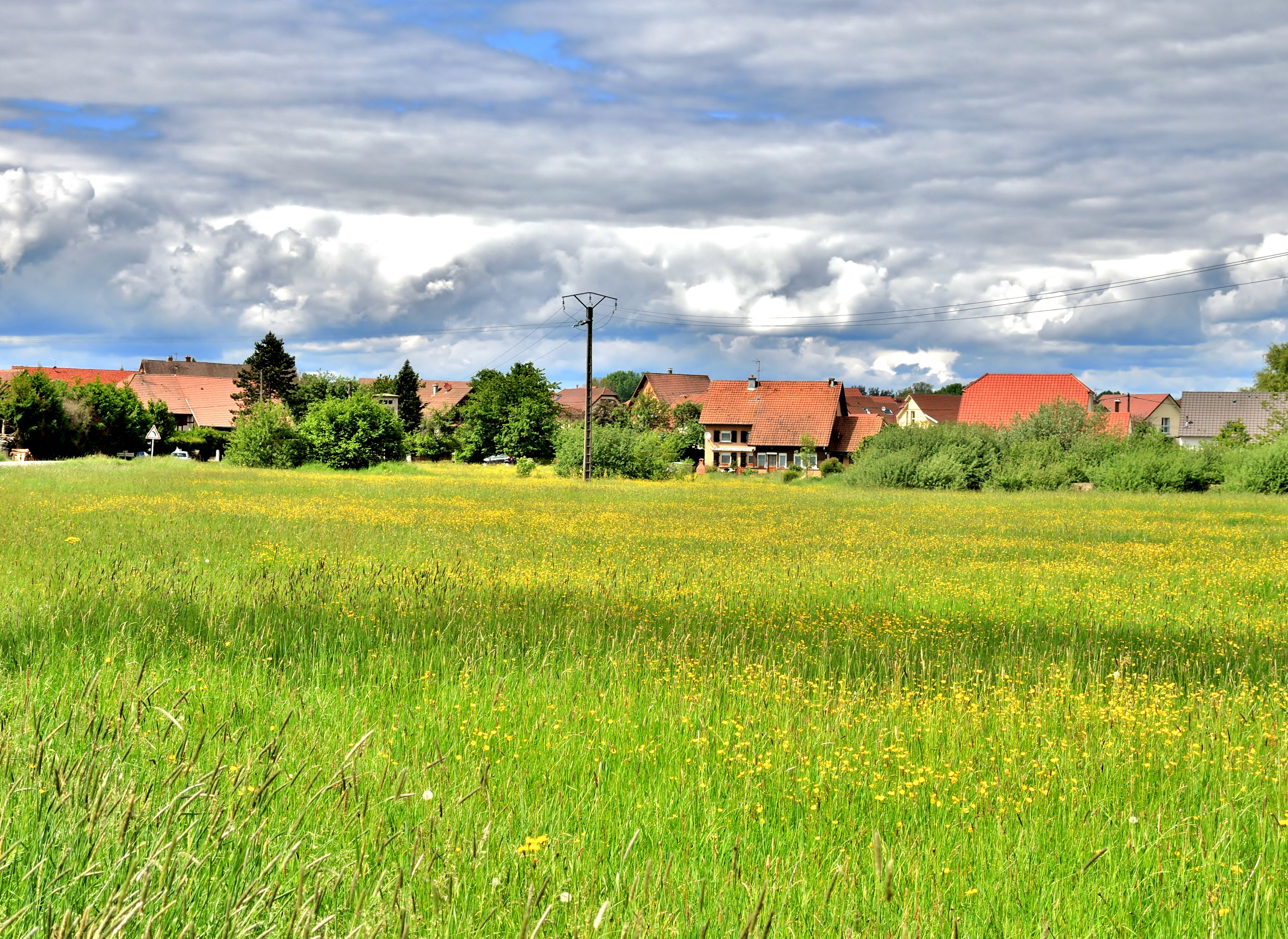 Le village de Charmois, vu de la route de Froidefontaine. Territoire de Belfort.